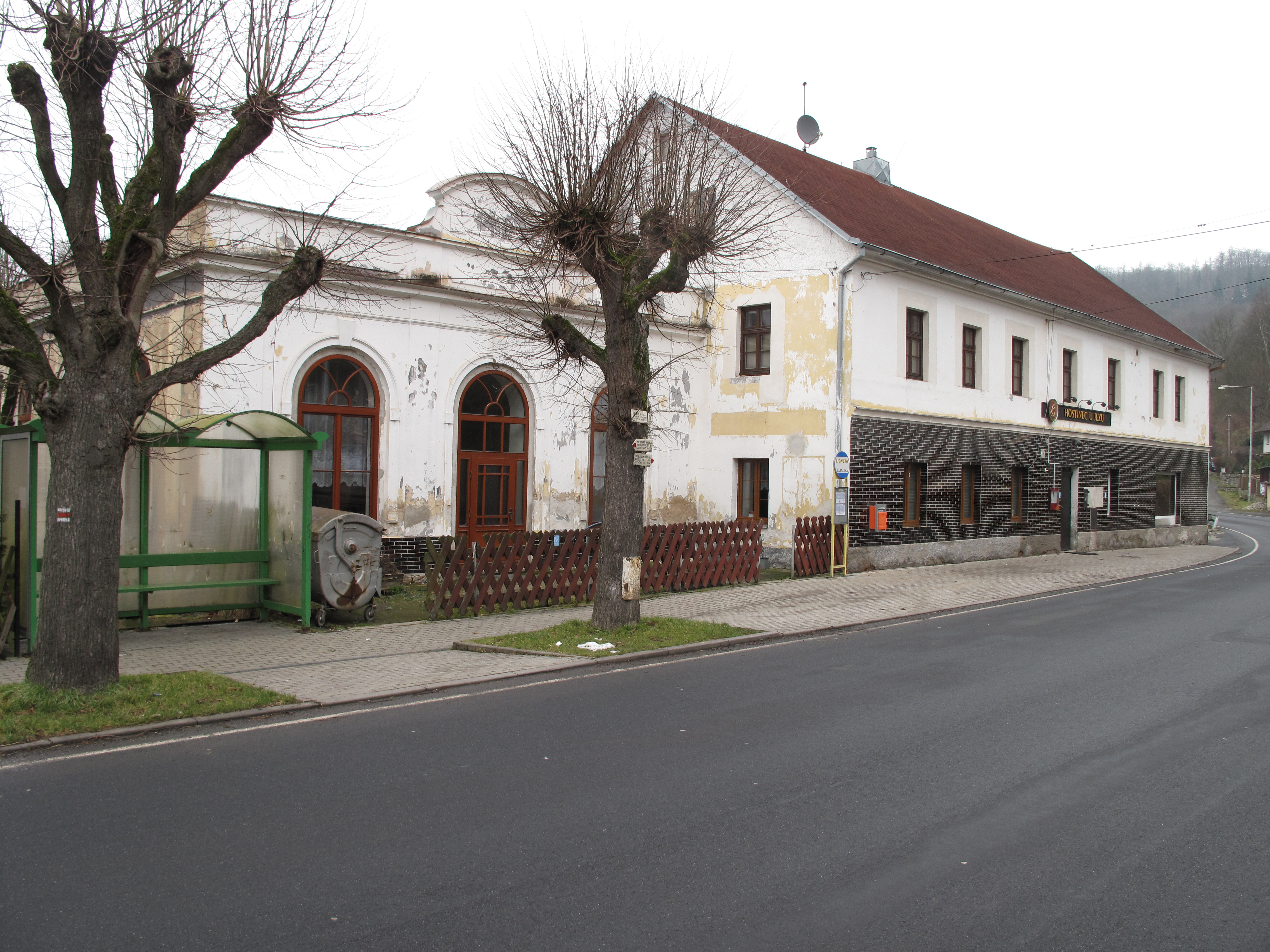 Restaurace v Dubině. Okres Karlovy Vary, Česká republika.